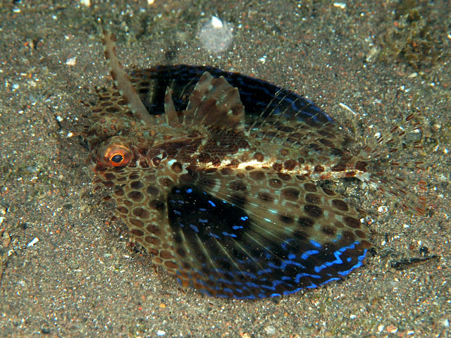 オキセミホウボウ Dactyloptena gilberti